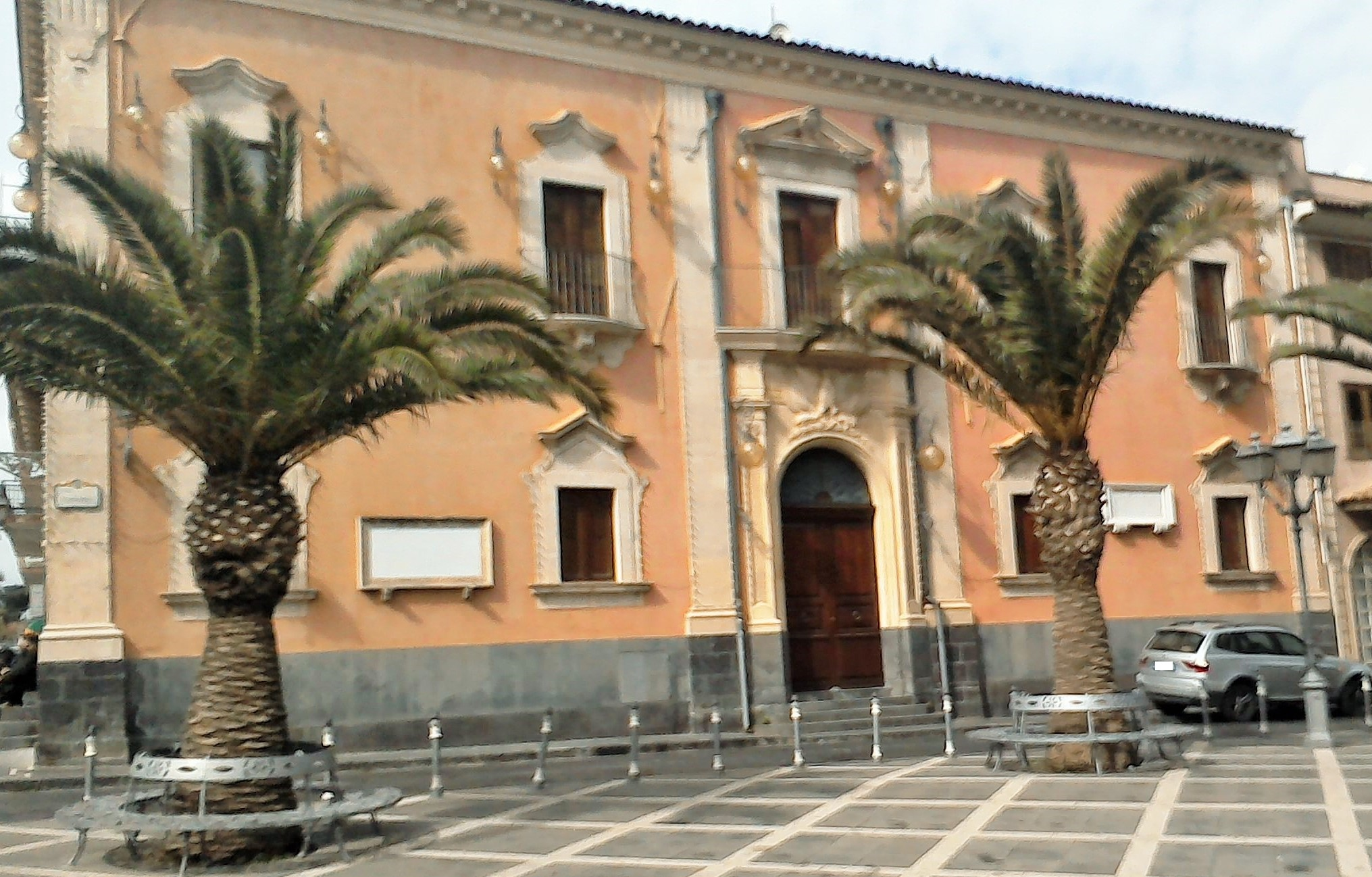 Il palazzo del Senato - Misterbianco